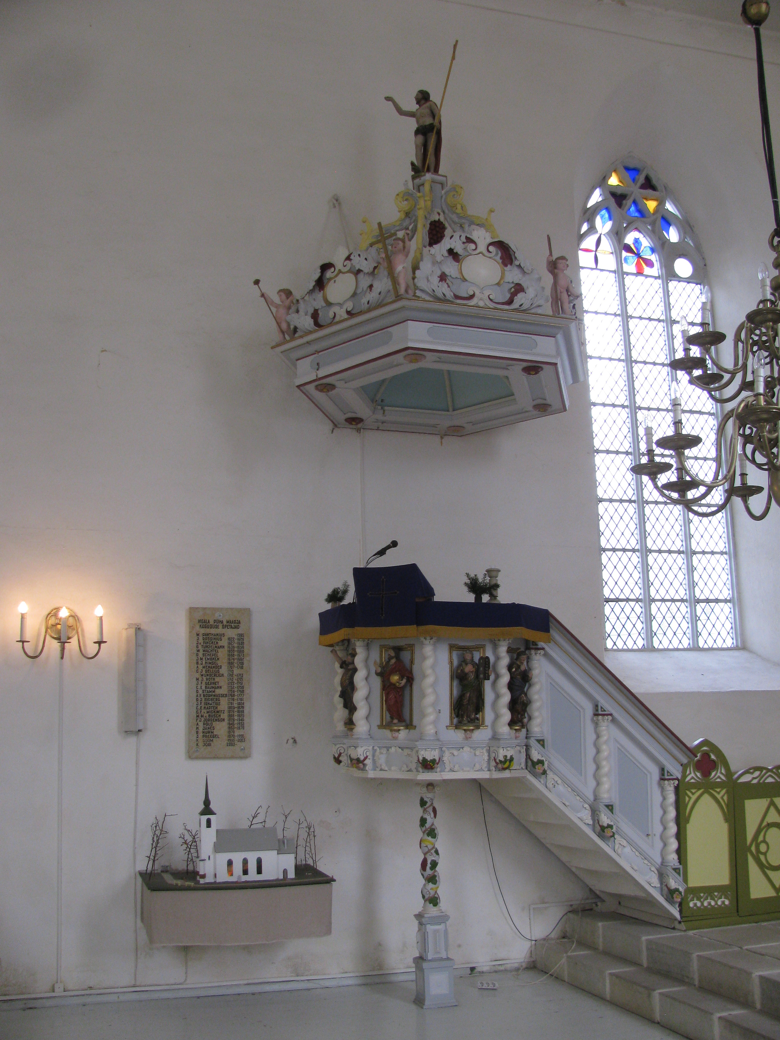 Vigala kiriku kantsel